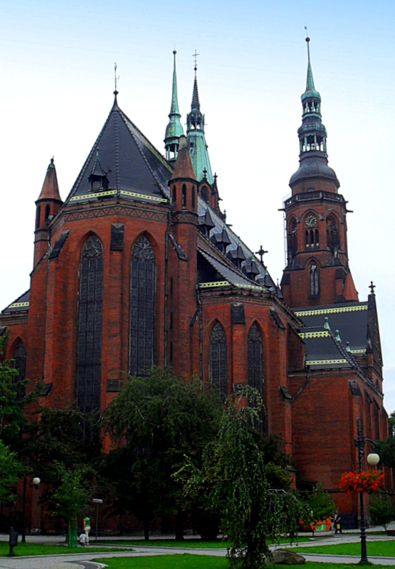 Legnica, katedra kościoła rzymskokatolickiego pw. śś Apostołów Piotra i Pawła